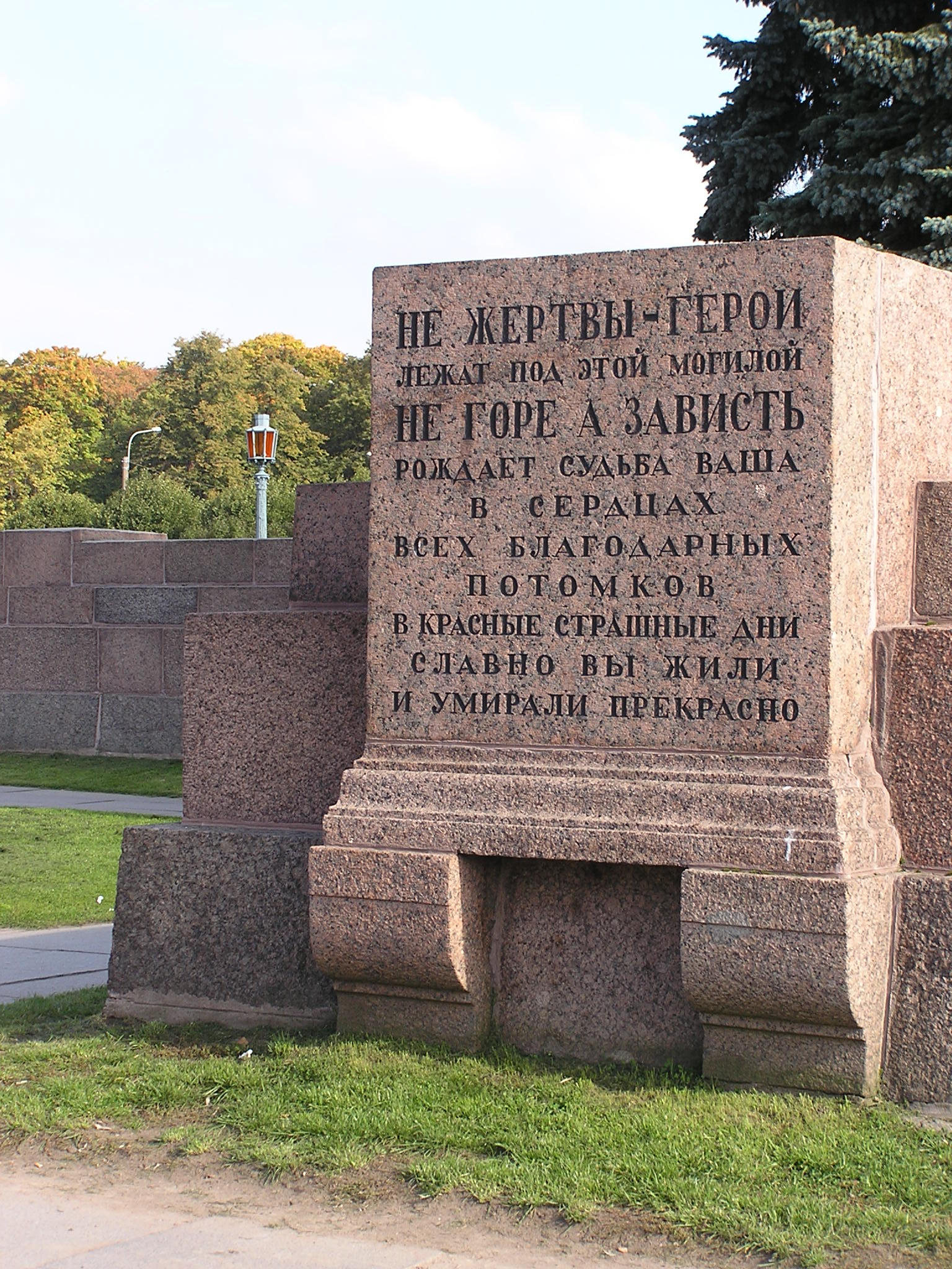 Санкт-Петербург. Марсово поле